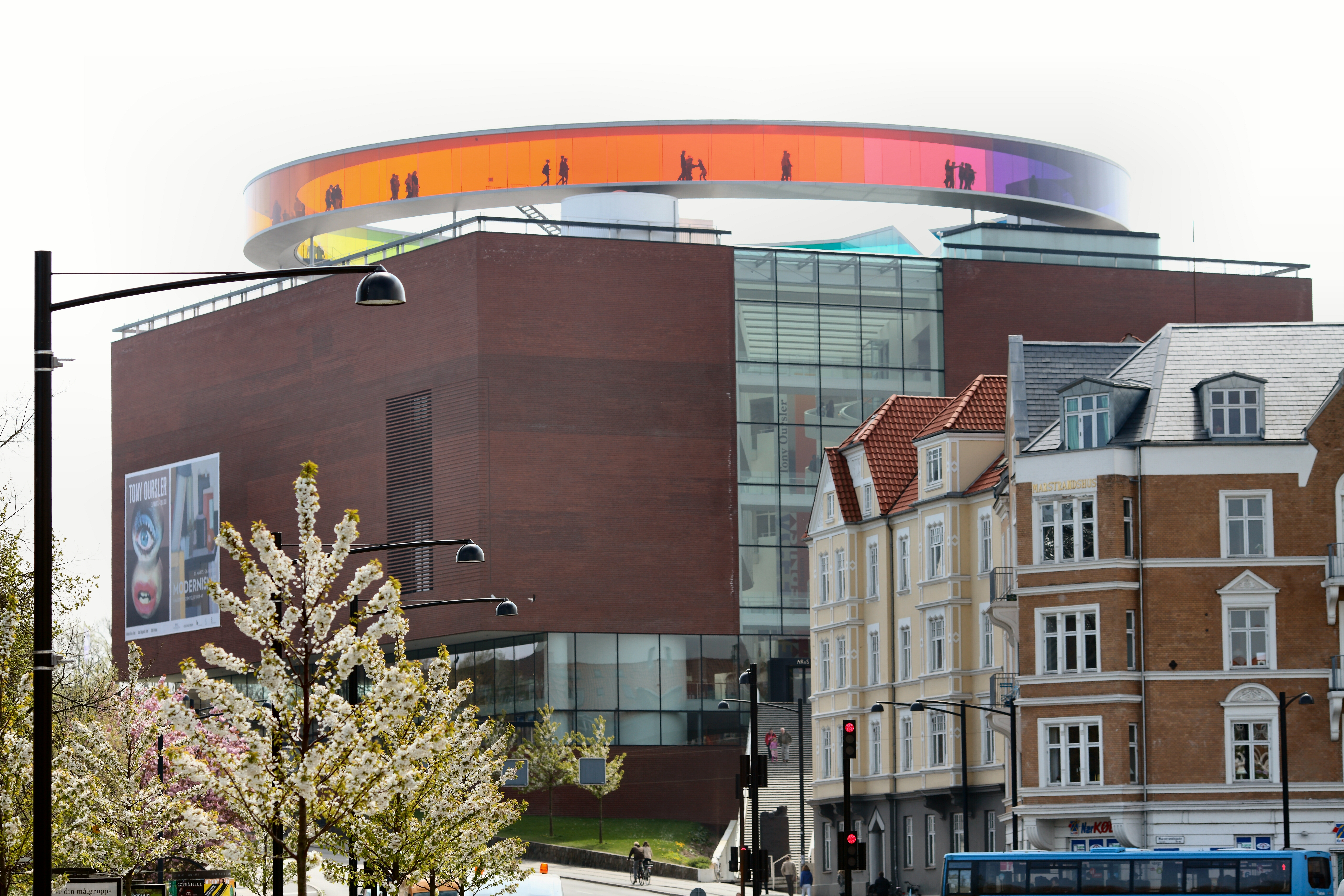 ARoS set fra Mølleparken, Aarhus, Denmark